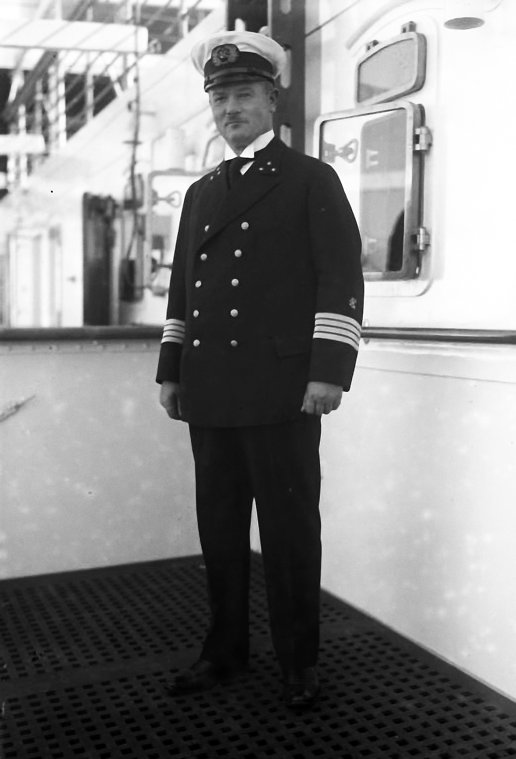 Mit Deutschlands schönstem Ozeanriesen nach Amerika! Der geniale Führer und Kapitän der "Bremen" Ziegenbein auf der Kommandobrücke.